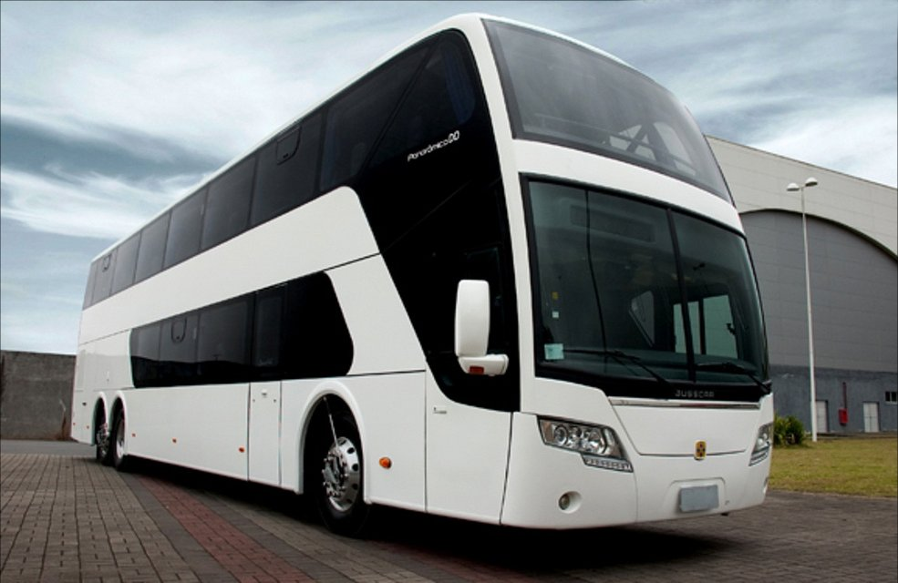 Panoramico DD S1, de Busscar Onibus